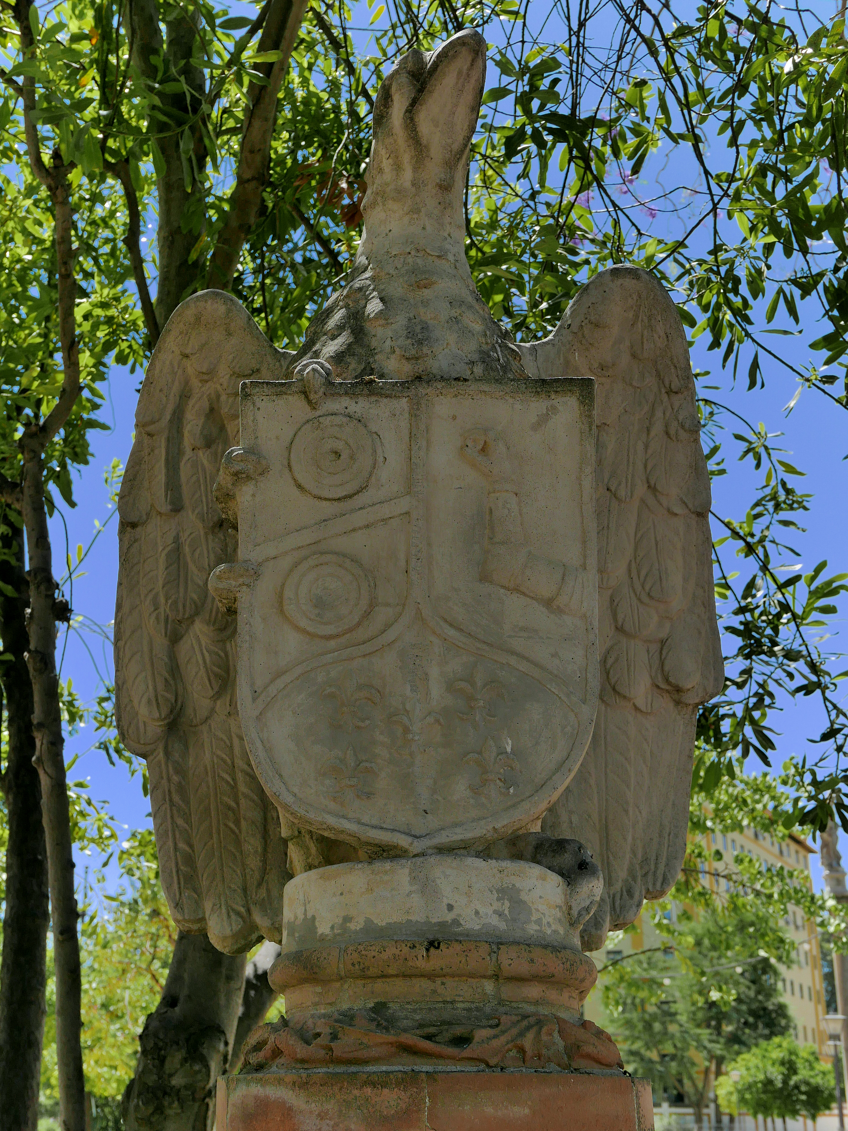 Escudo del Real Señorío de Molina. Escultura de José Ordóñez Rodríguez para el Pabellón Real de Sevilla.